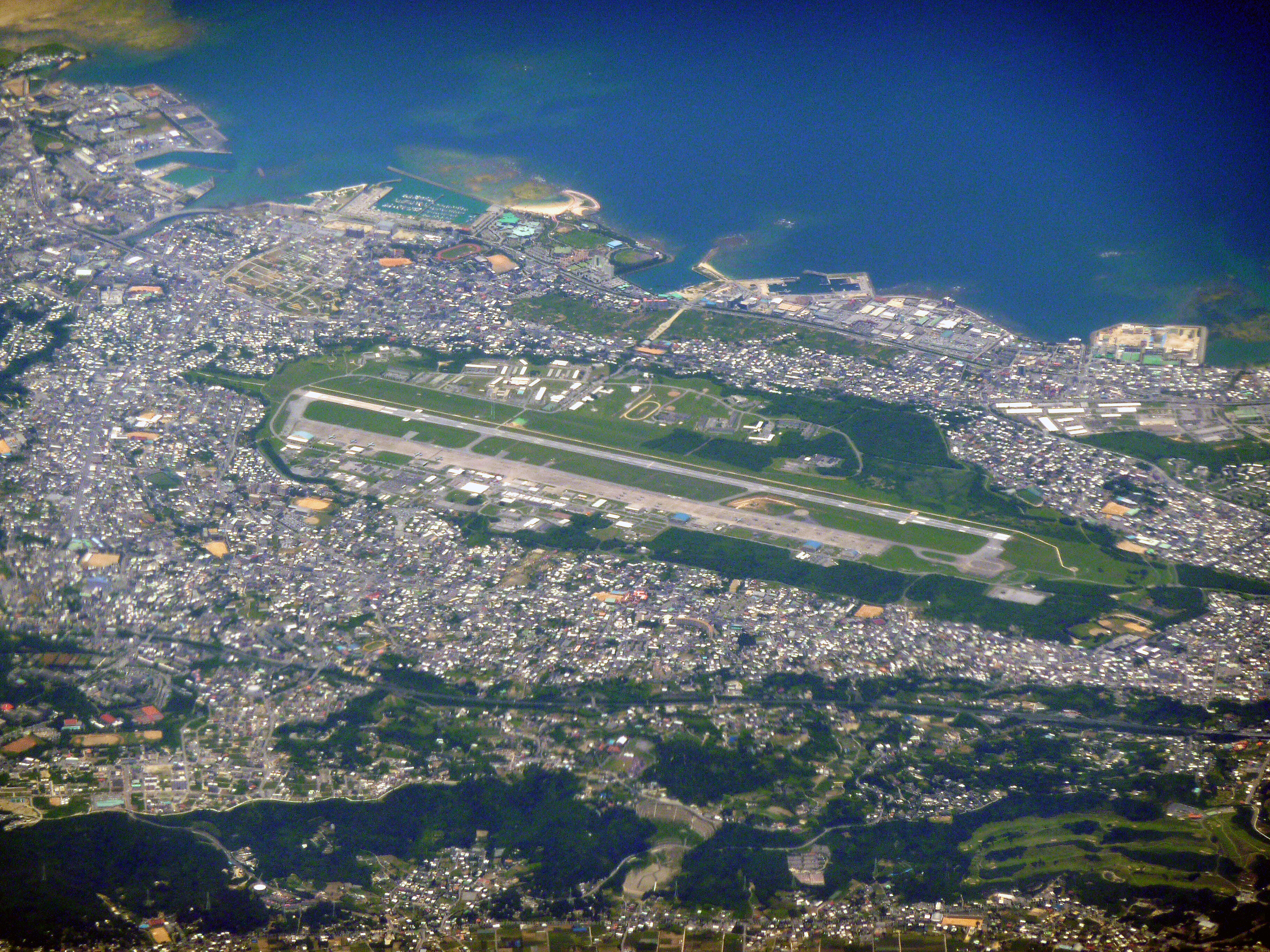 普天間飛行場空撮画像